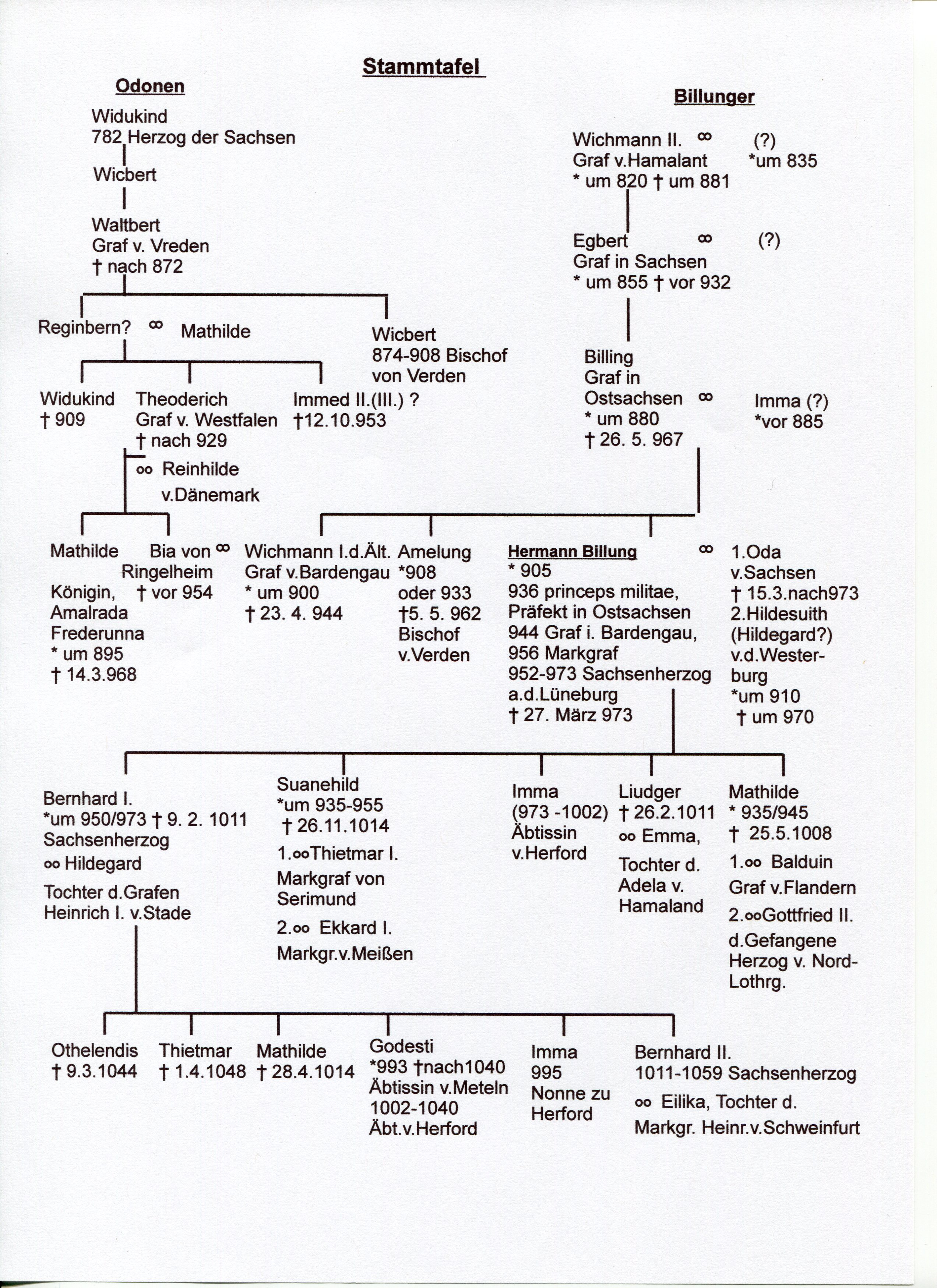 Stammtafel der Odonen und der Billunger, insbesondere von Hermann Billung